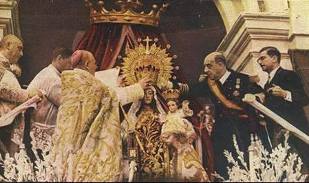 Coronación